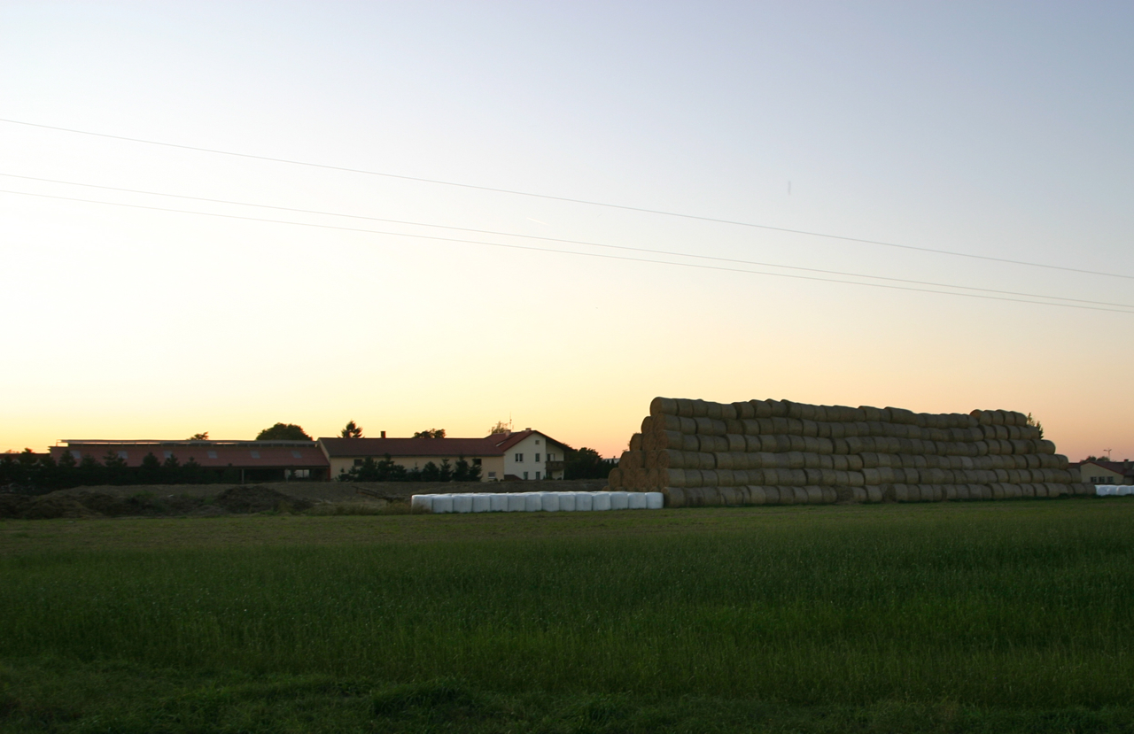 Kózki – wieś w Polsce położona w województwie opolskim, w powiecie kędzierzyńsko-kozielskim, w gminie Pawłowiczki.